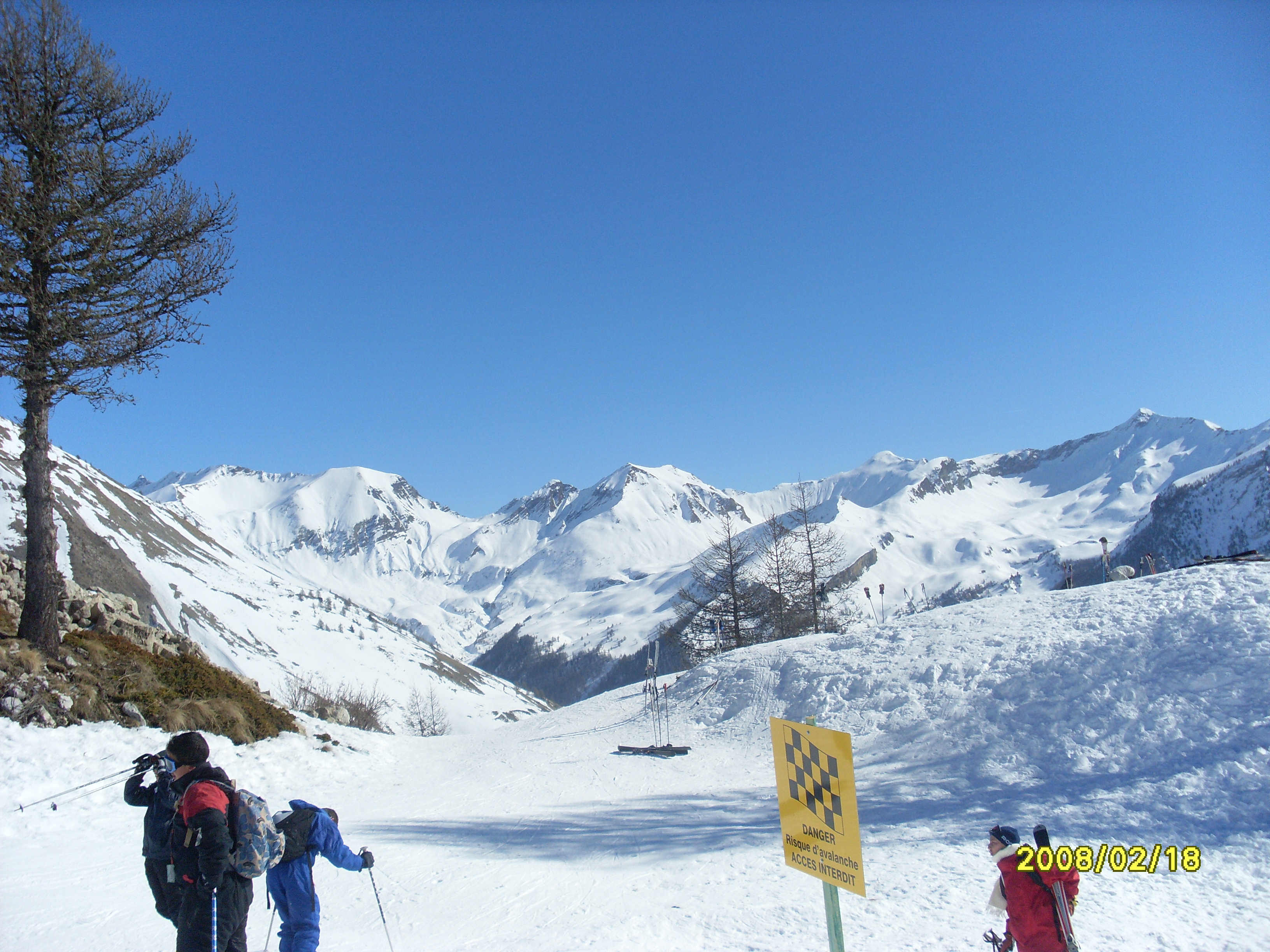 Pistes de ski d'Ancelle (05)